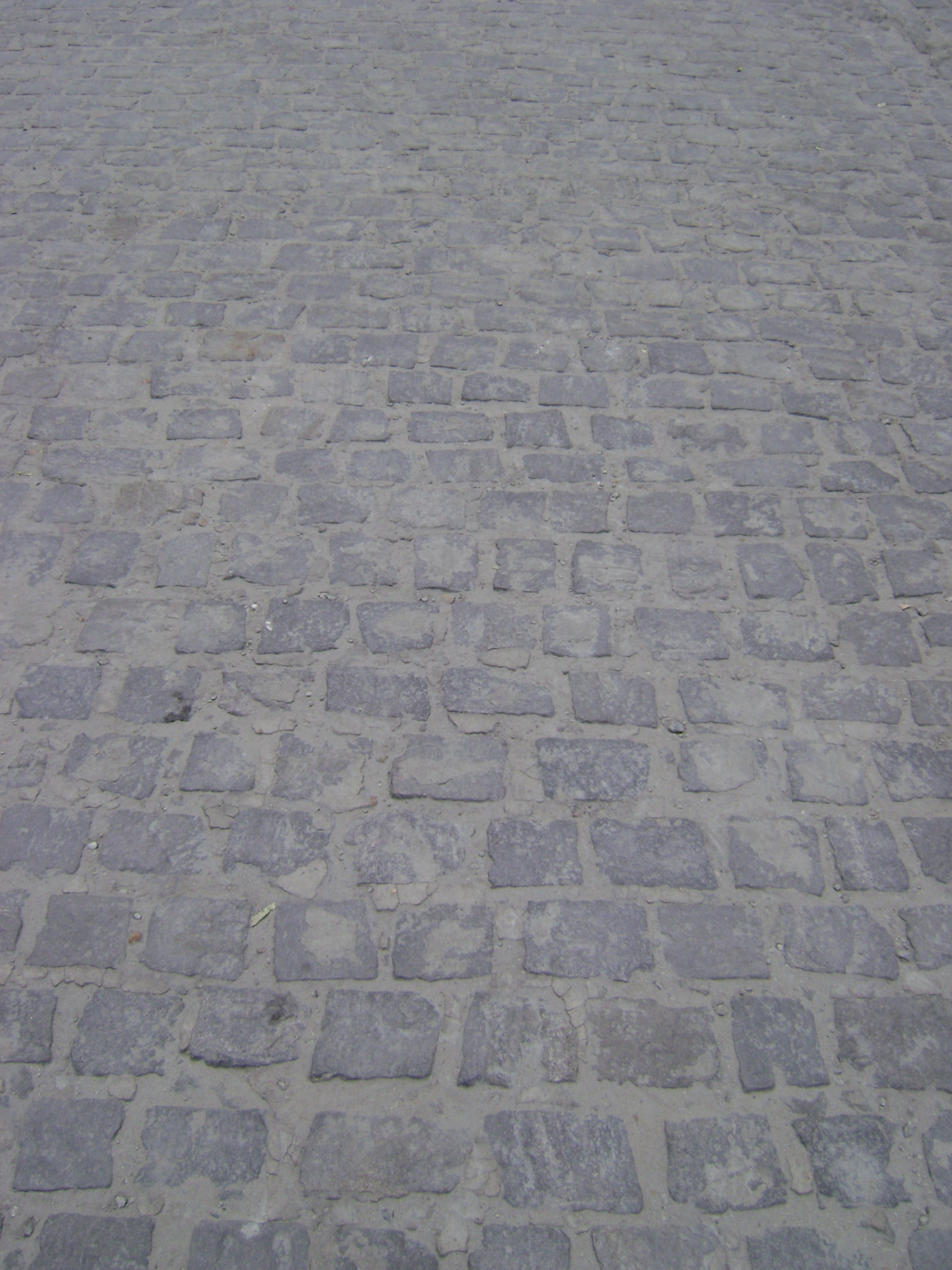 Calçamento no Apoio Rodoviário de Jequié, no estado da Bahia, Brasil.